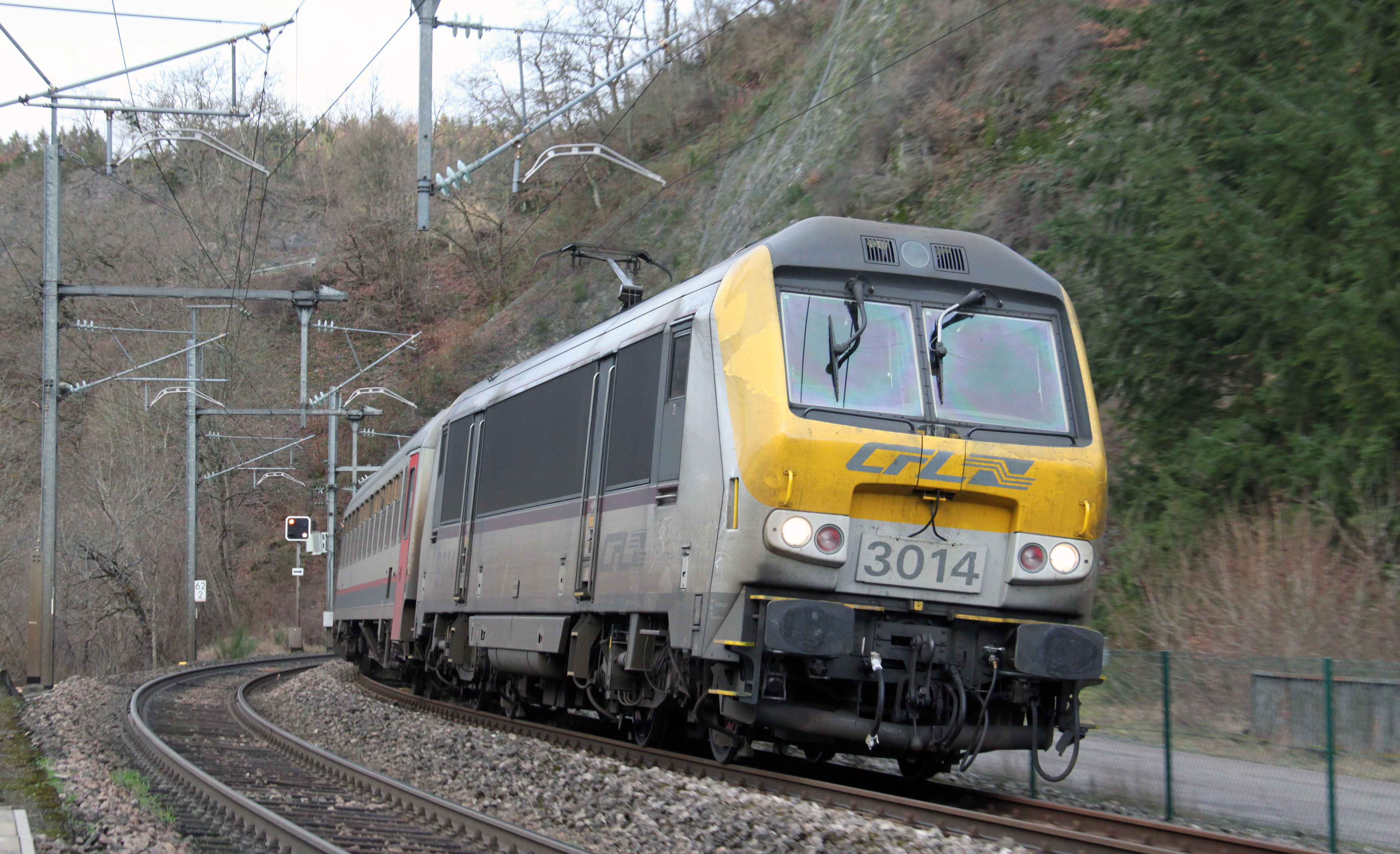 CFL locomotief 3014 komt binnen met een trein op het Luxemburgse station Kautenbach.